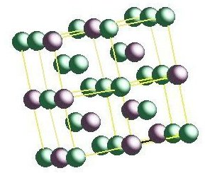 Model kristalne strukture substitucijske trdne raztopine, v kateri je del atomov topila (zelene kroglice) zamenjan z atomi topljenca (rdeče kroglice).